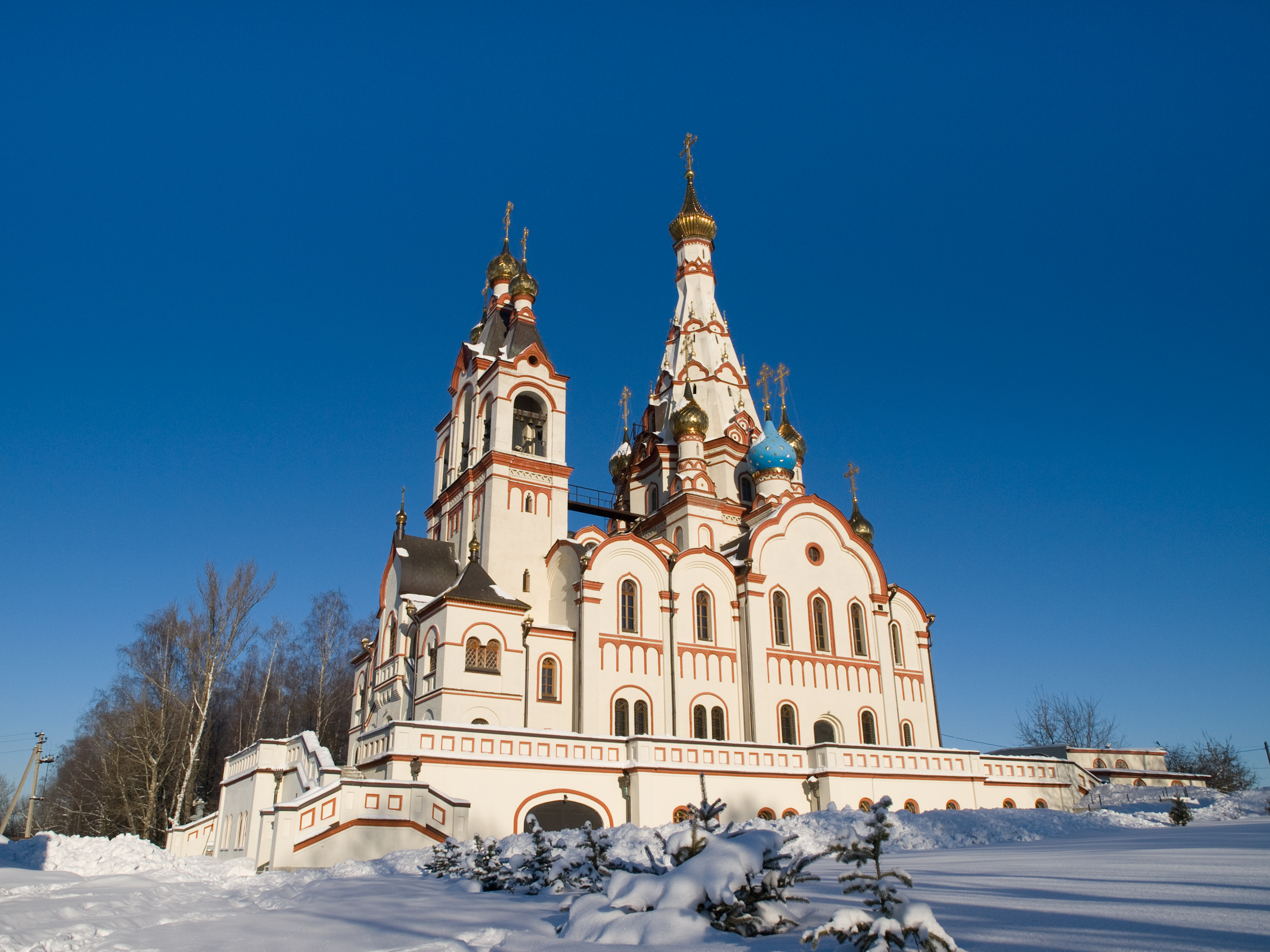 Храм Казанской Иконы Божьей Матери (Долгопрудный)